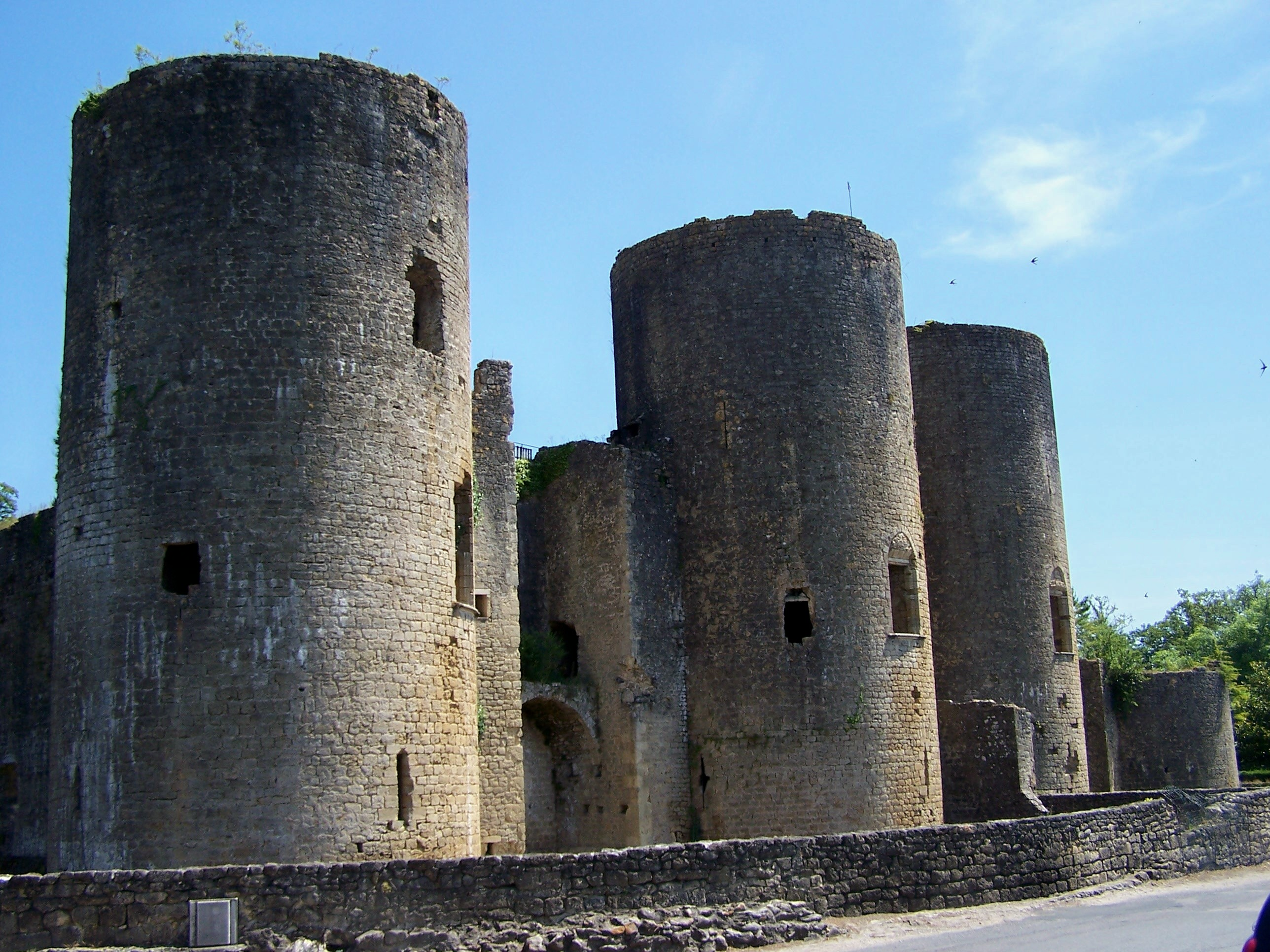 Château de Villandraut, Gironde, France